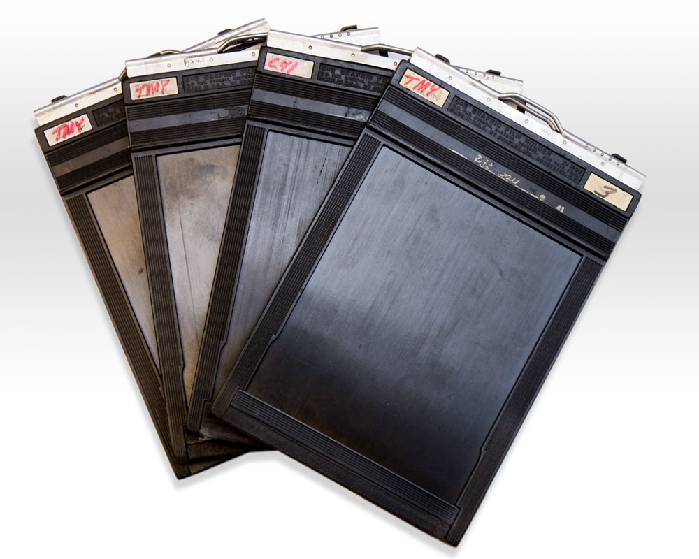 4X5 Film Holders